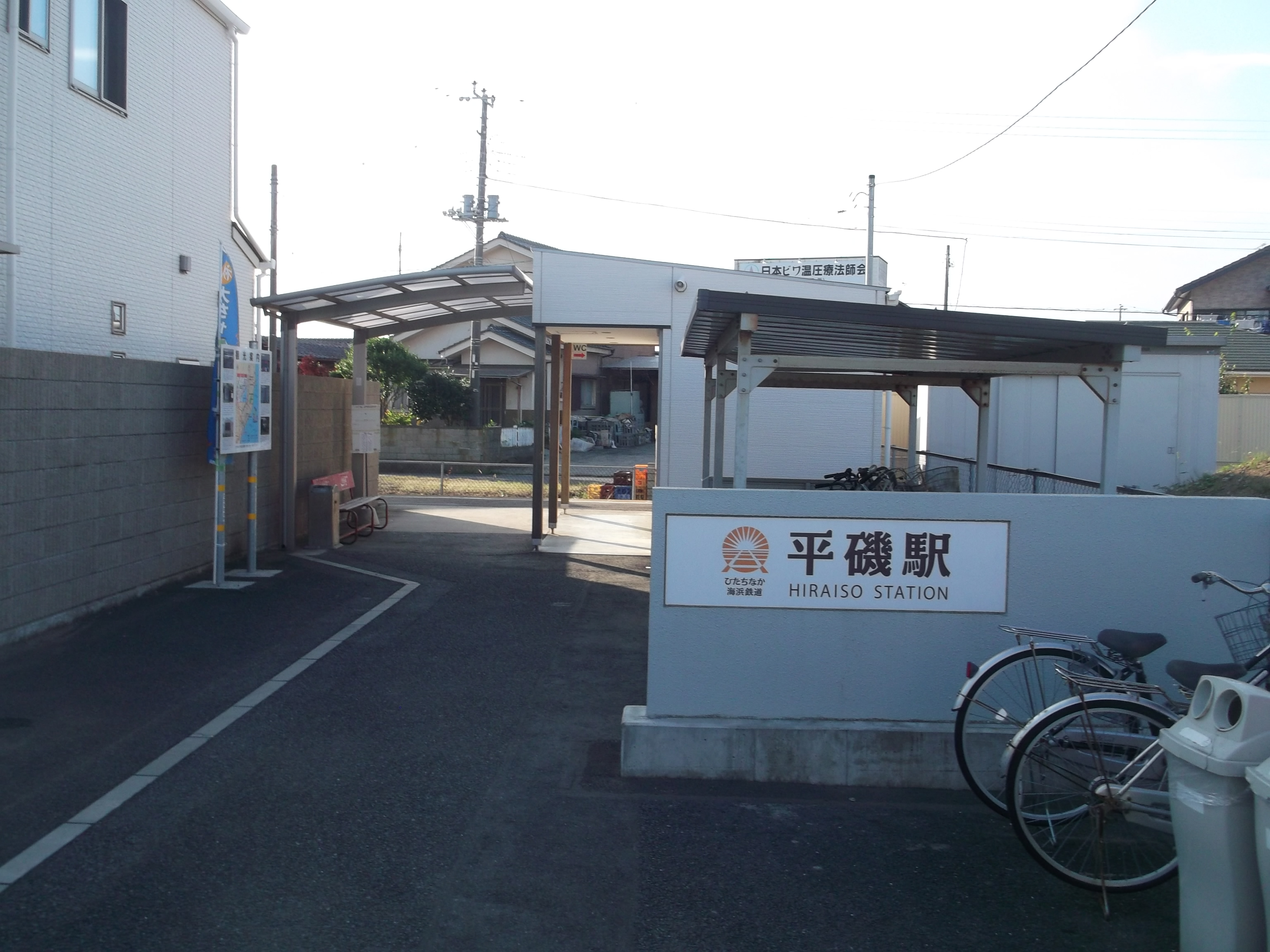 ひたちなか海浜鉄道 平磯駅入口